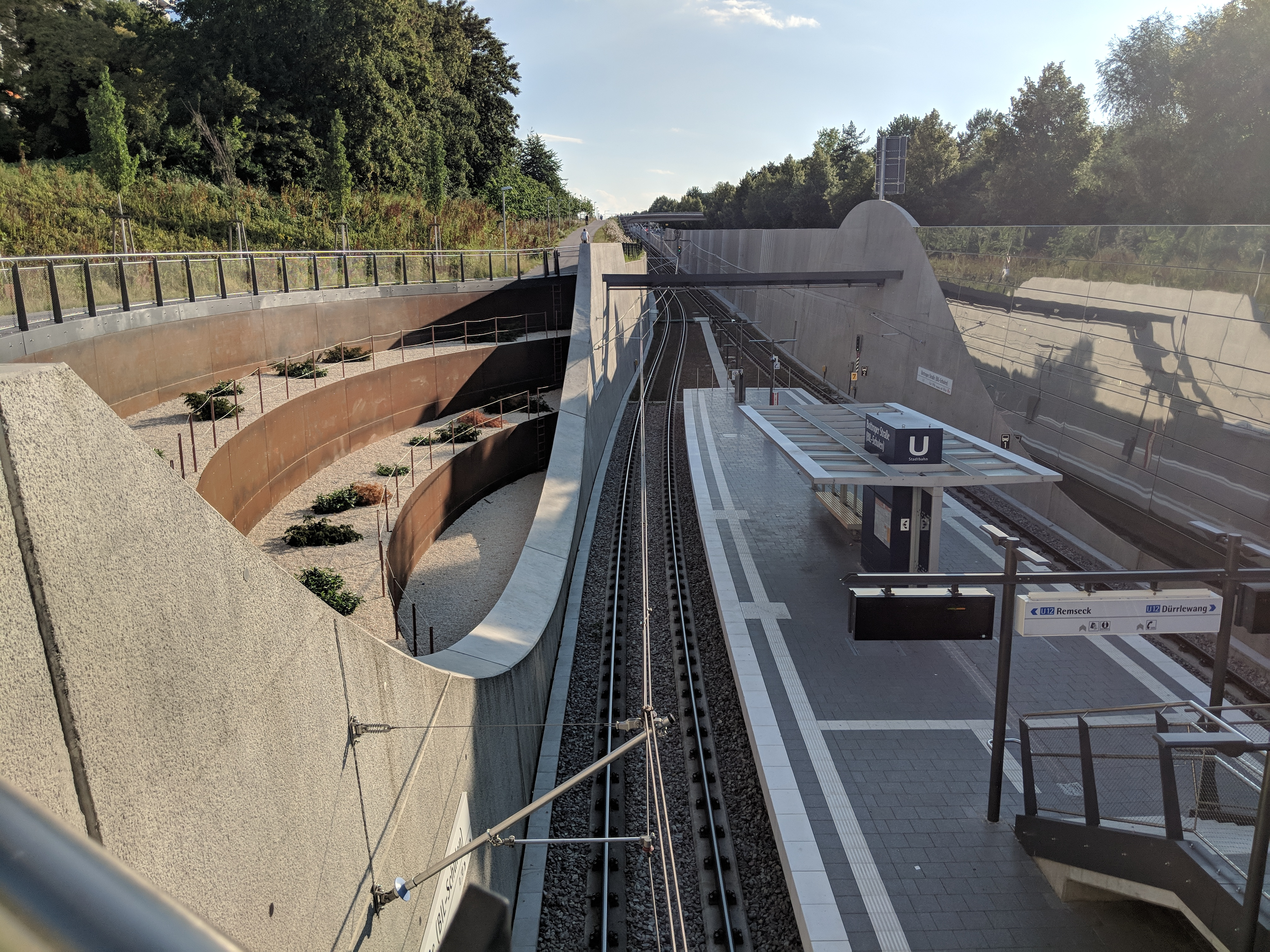 Die Stadtbahnhaltestelle Bottroper Straße